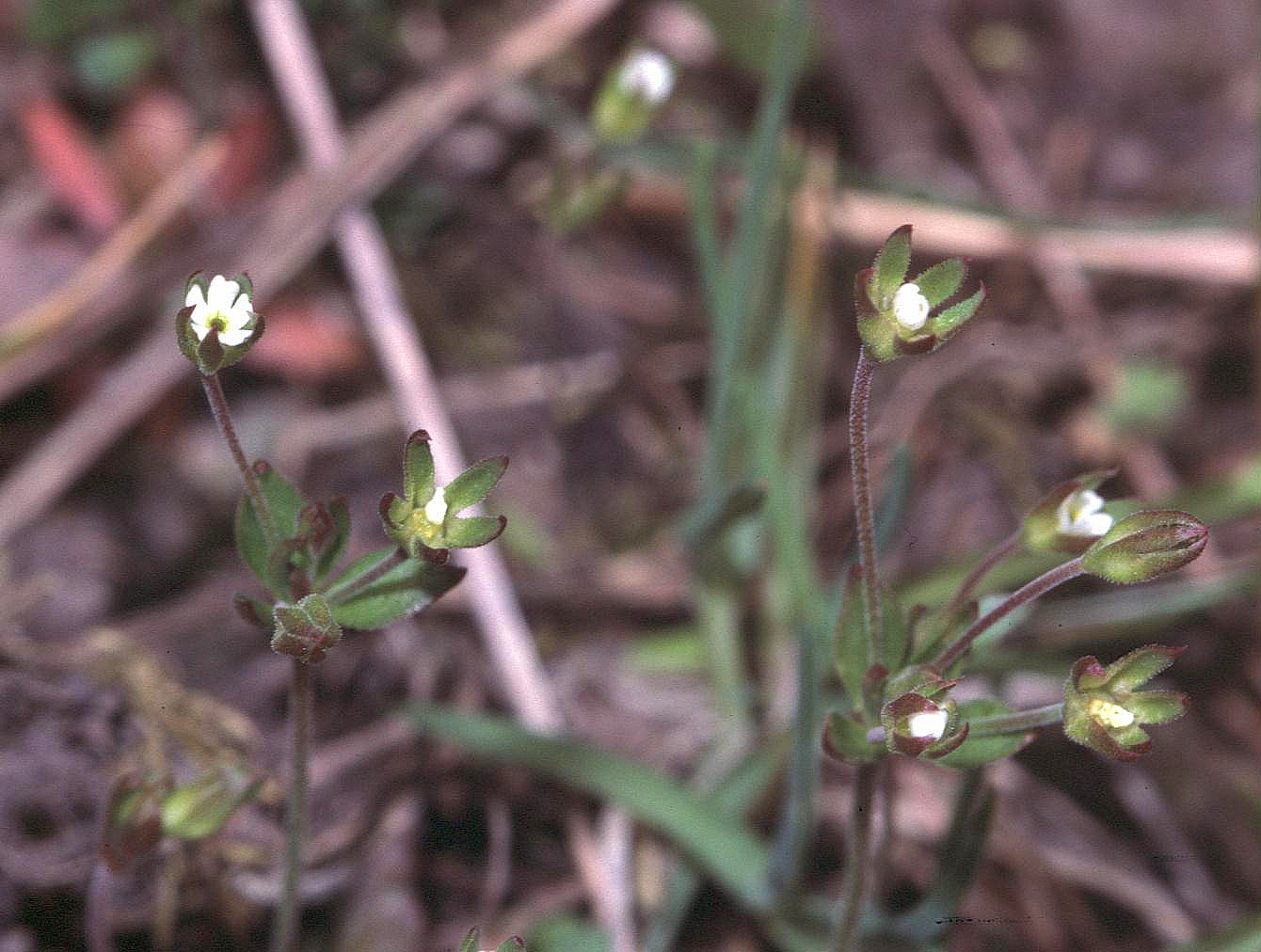 Wegbeschreibung nach Riedenheim